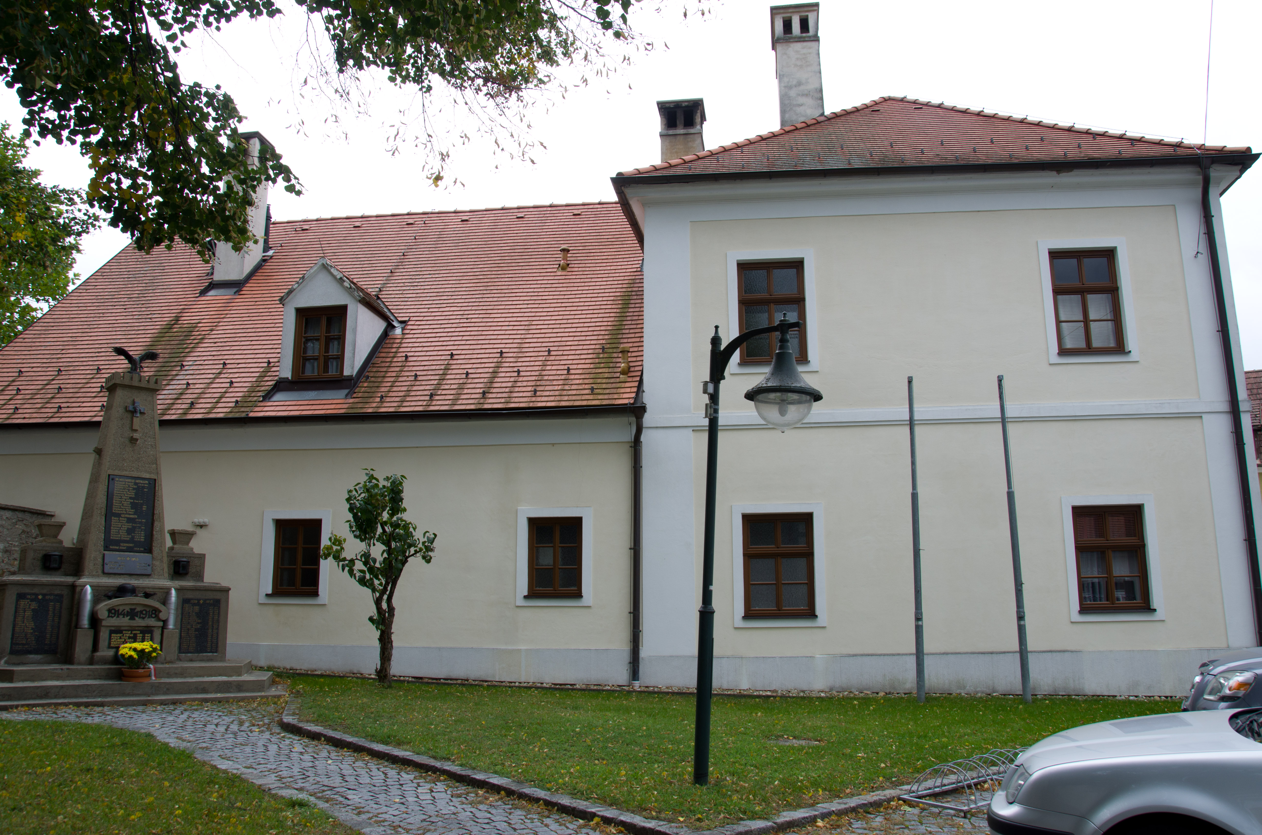 Pfarrhof